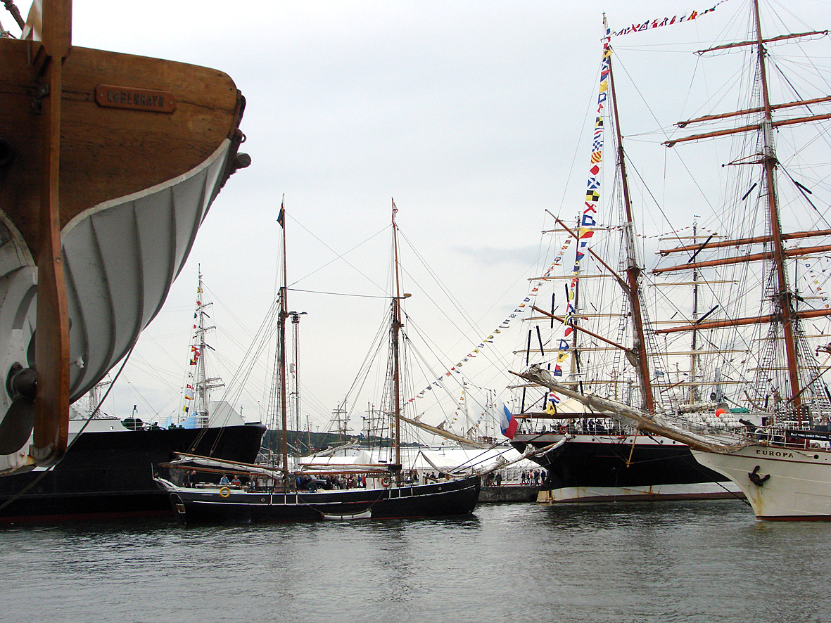 Tall Ships races i Aarhus 2007